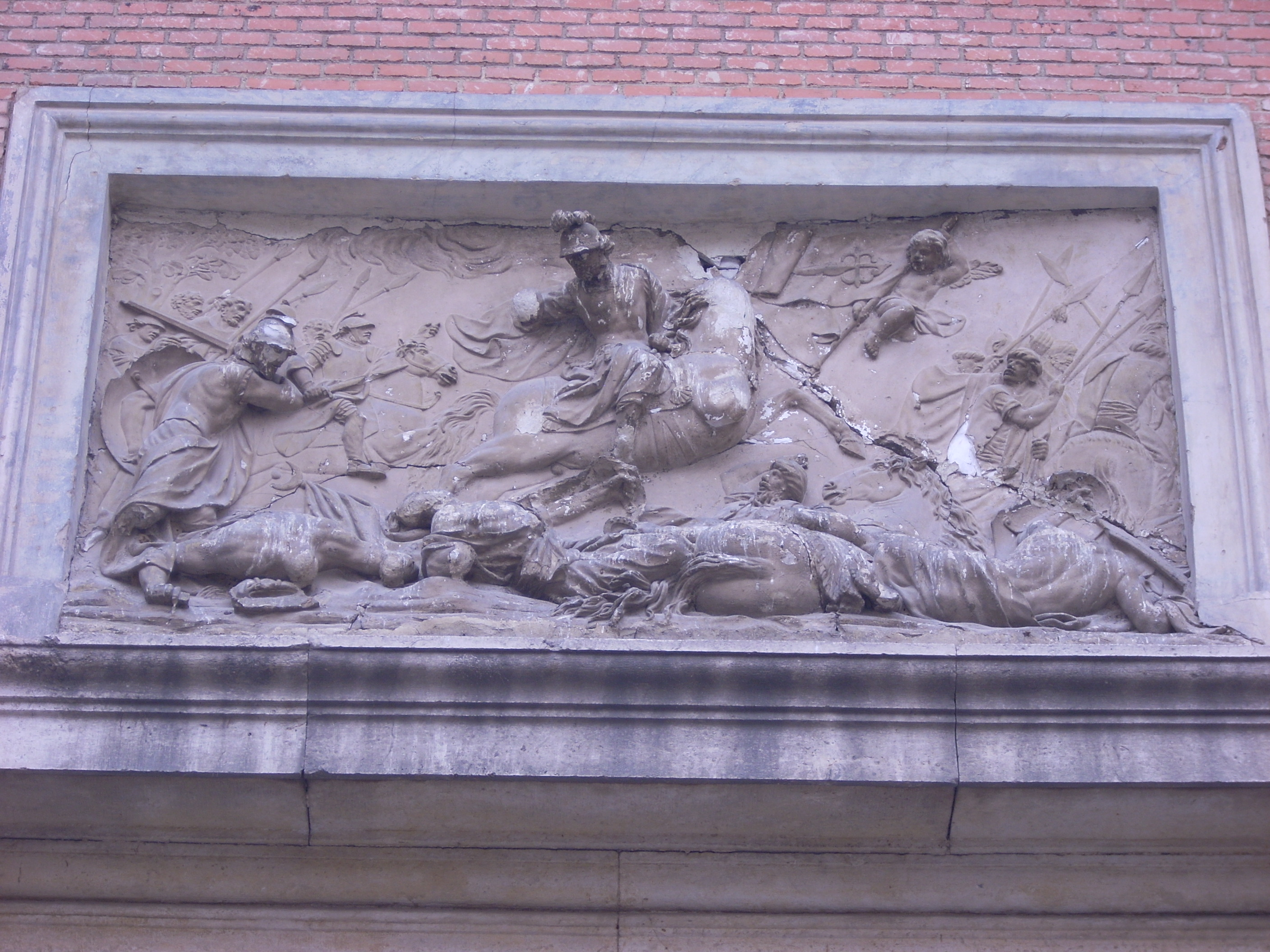 Detalle de la fachada de la iglesia de Santiago (Madrid)